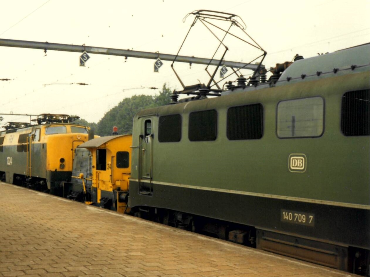 Station Venlo, locomotiefwissel met NS serie 1200, Sik en DB serie 140 (foto: Daniel van der Ree, 18 augustus 1987)